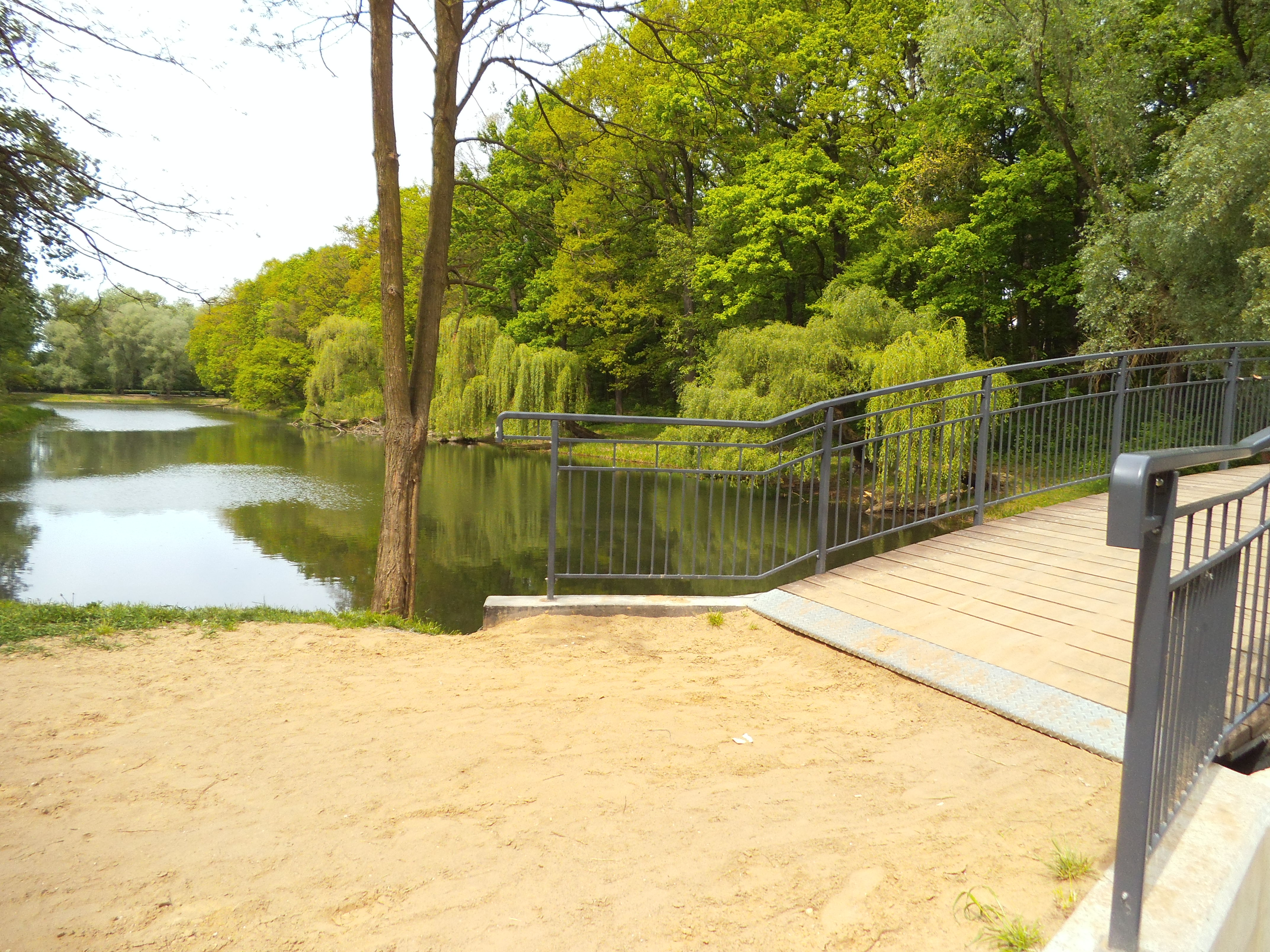 Martwa Wisła w Toruniu